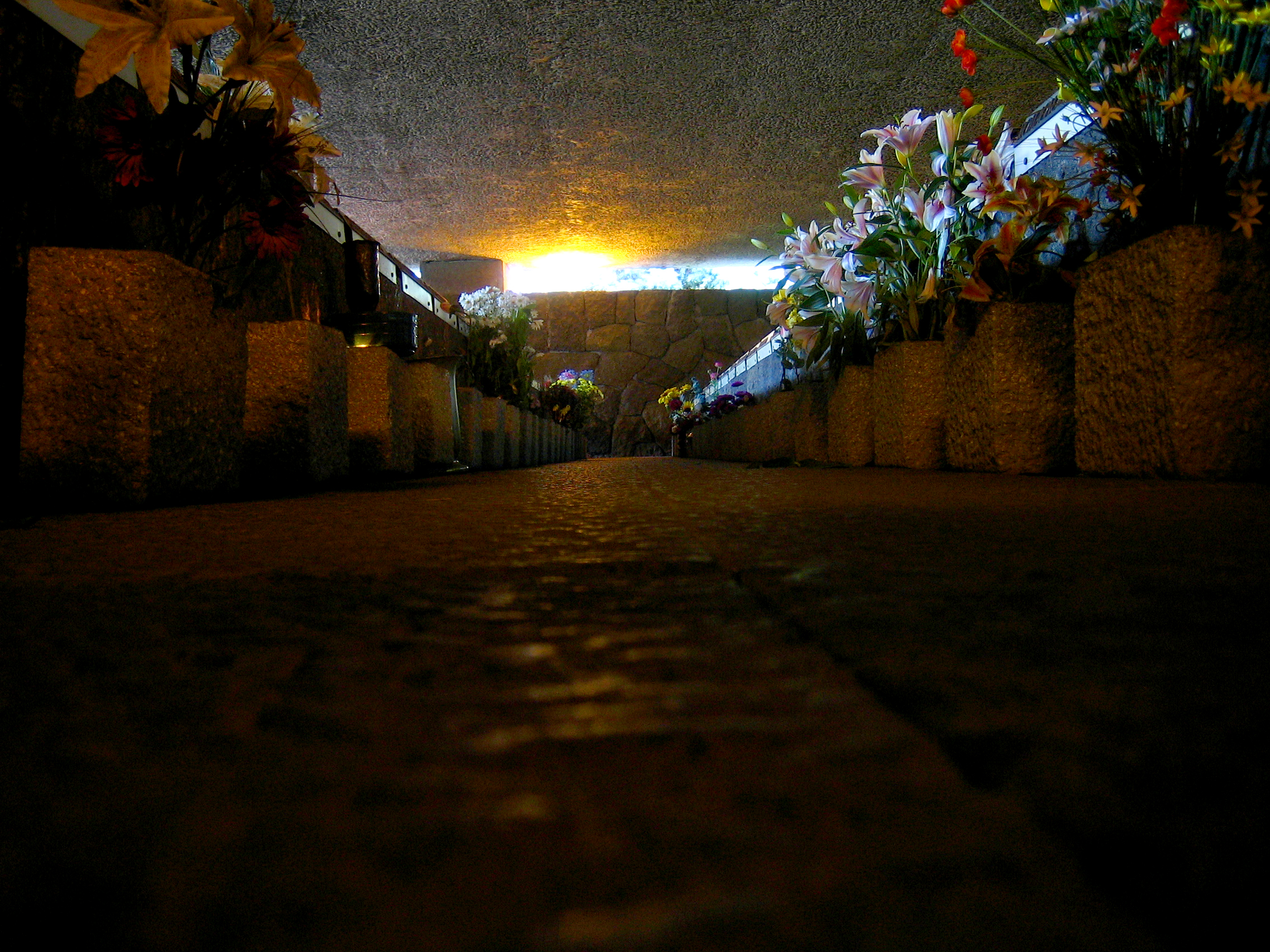 Fosse Ardeatine, Roma, Italia